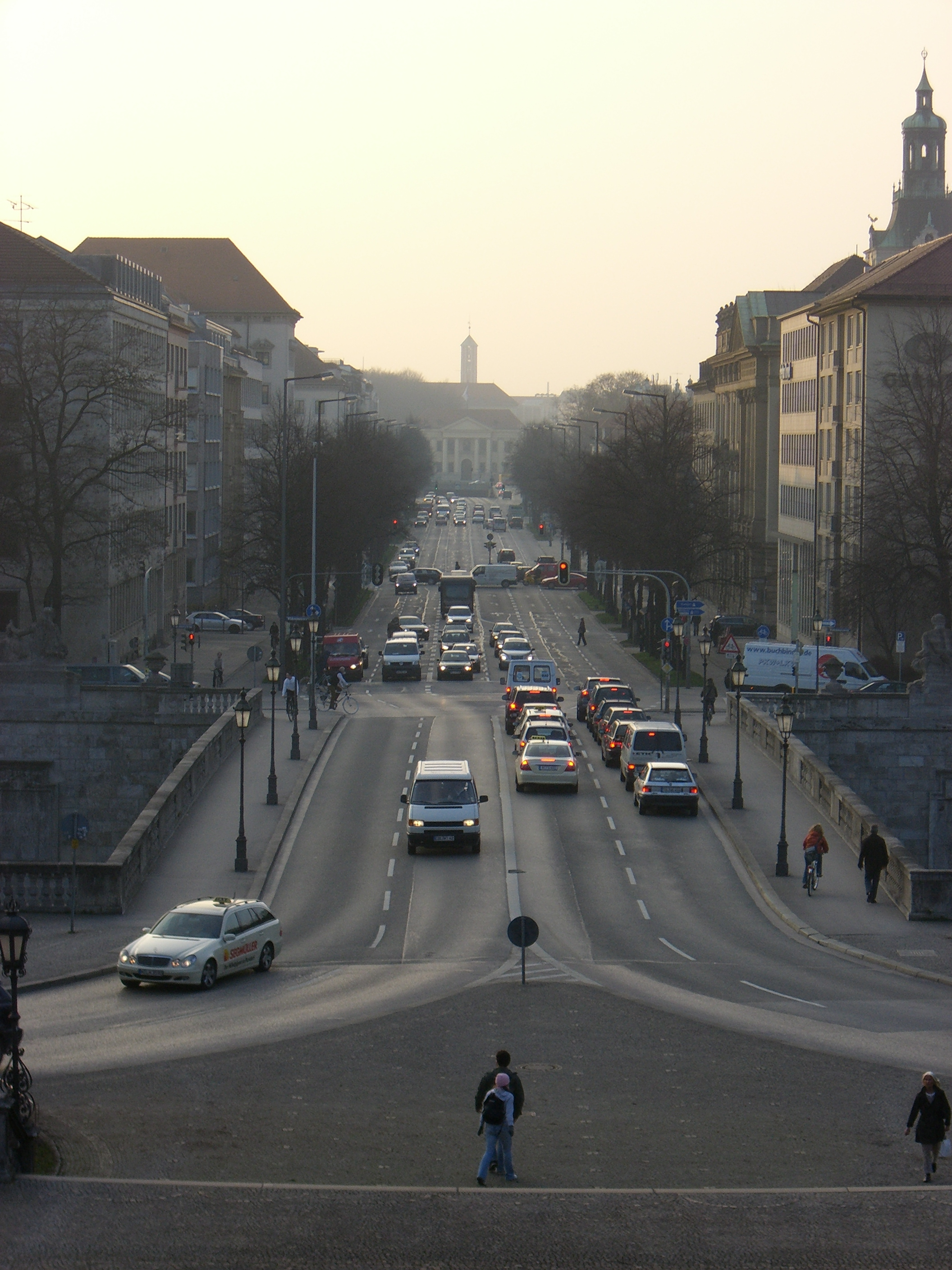 Prinzregentenstraße (Blick nach Westen)